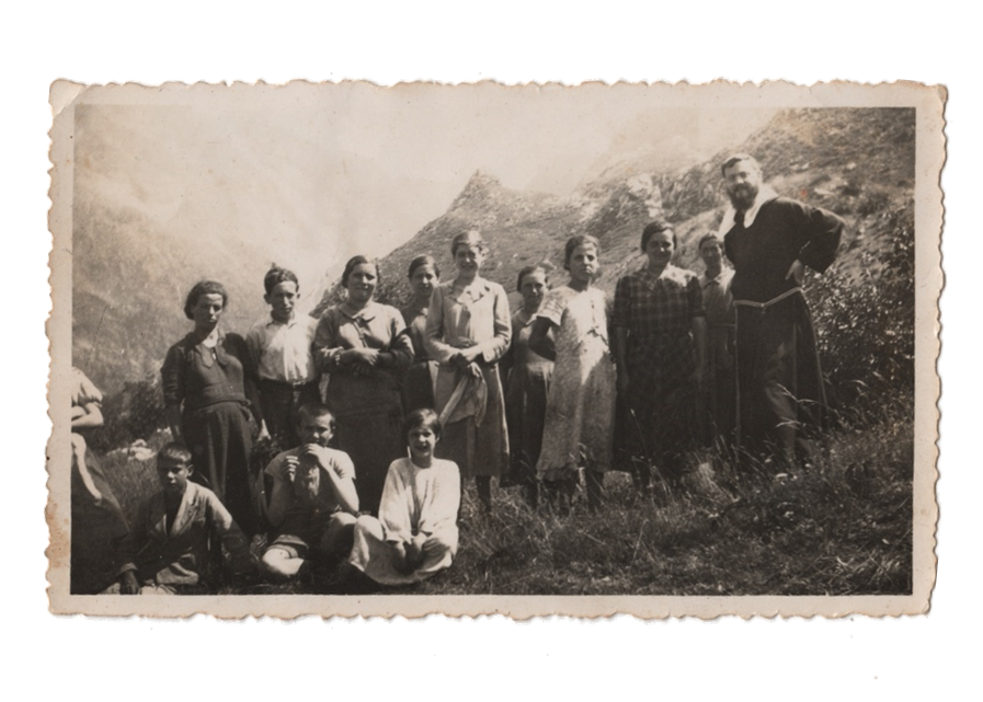 Donne di Retignano e il parroco durante una scampagnata per i monti, inizi del Novecento